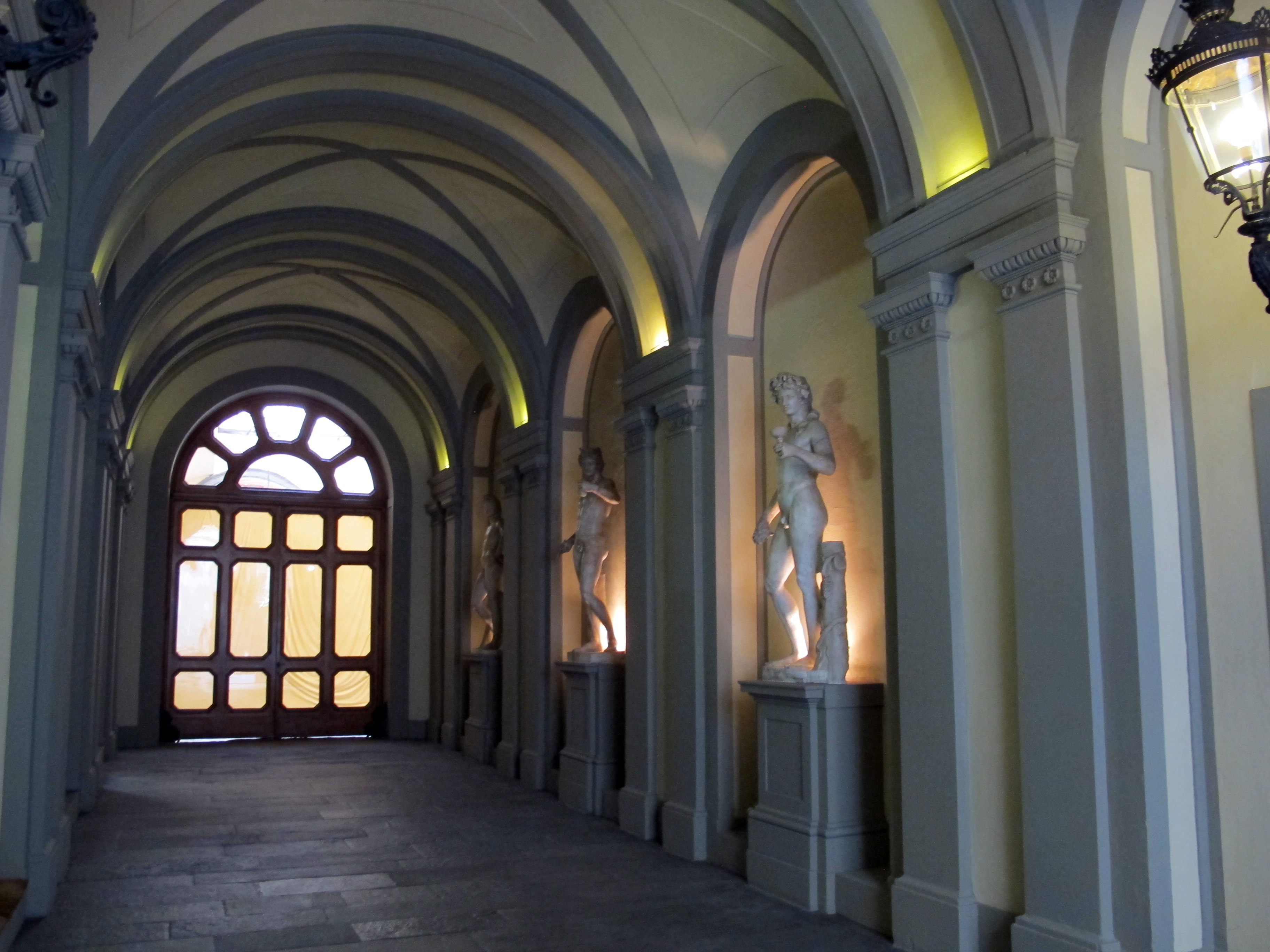 Palazzo gerini, adrone